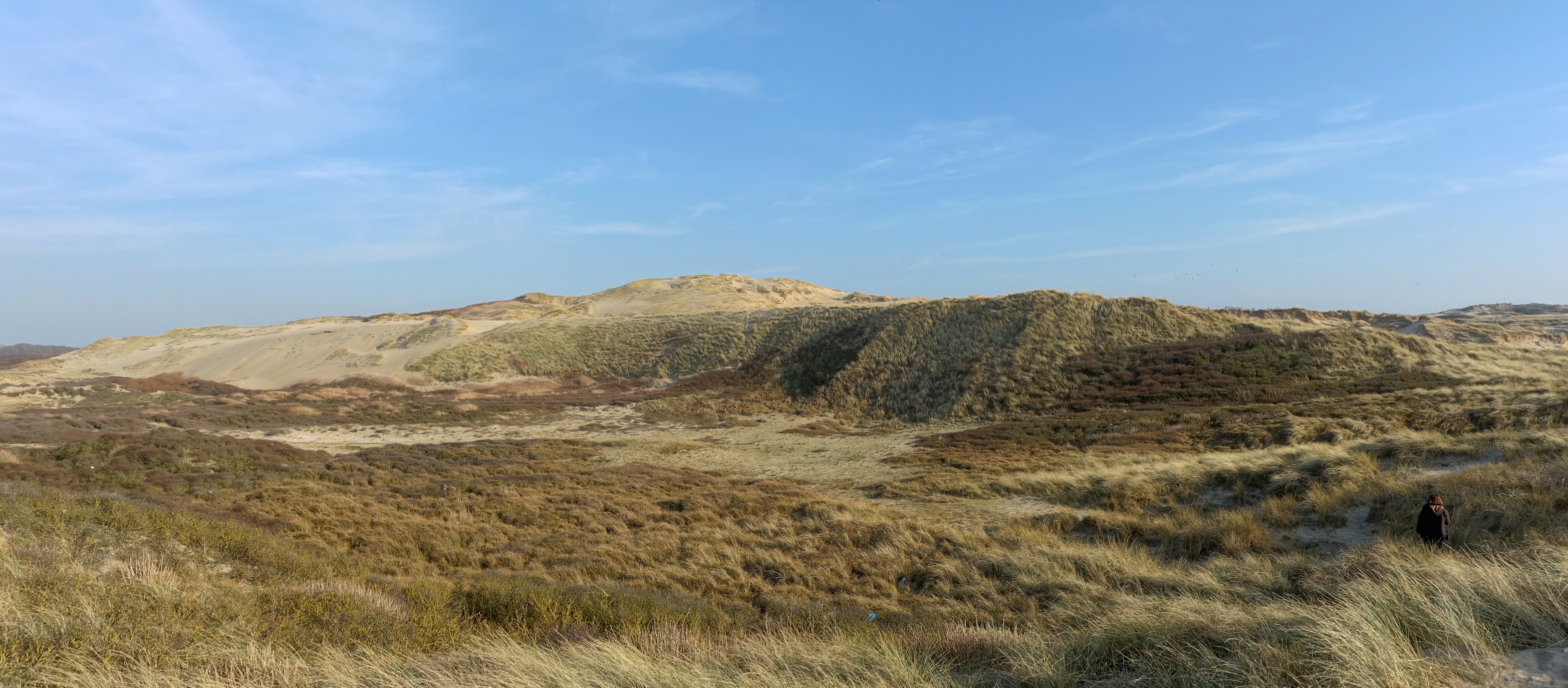 Les dunes de la Slack près d'Ambleteuse.